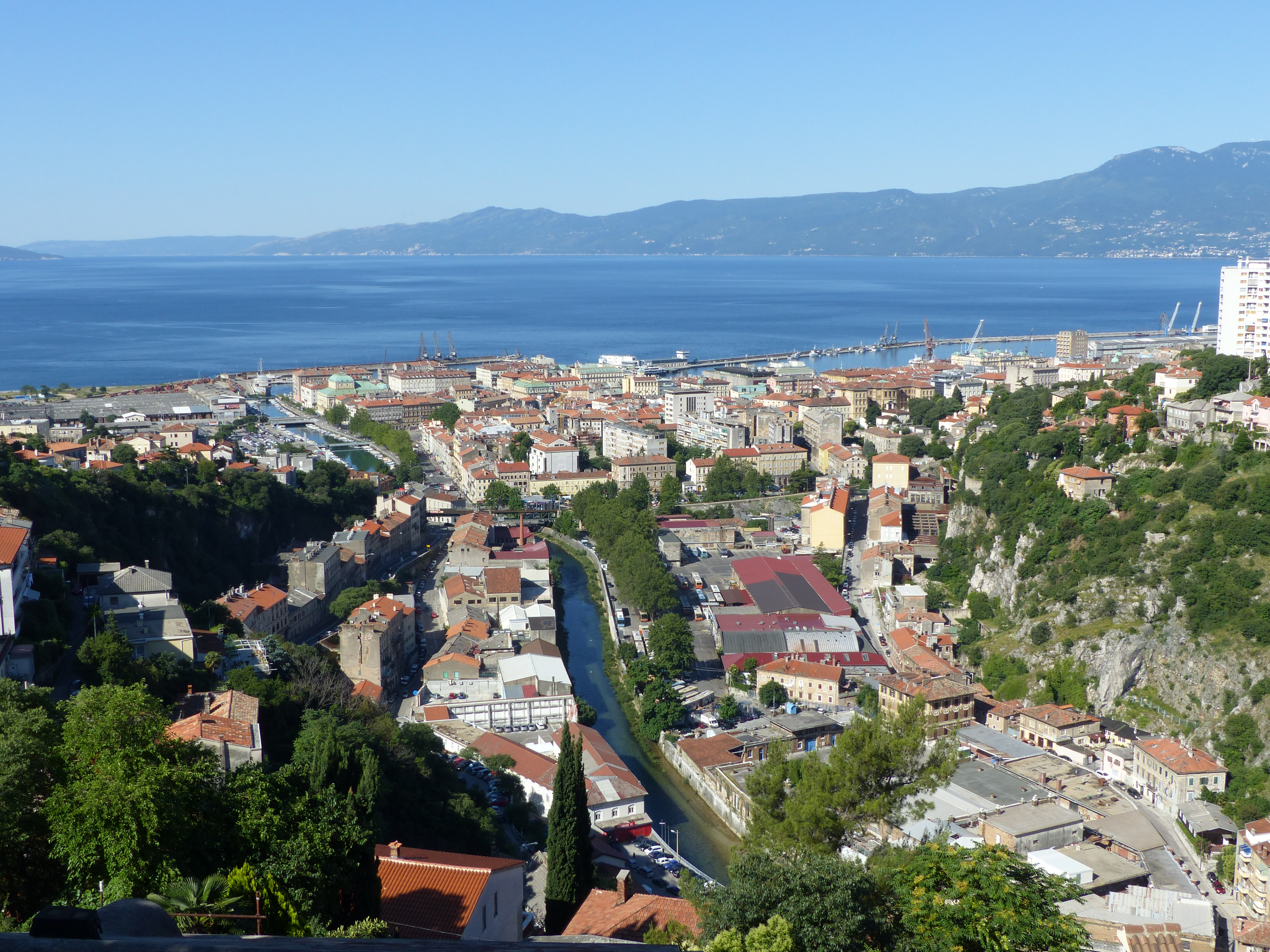 A felvétel 2016. június 28-án készült a Fiuméhez (Horvátország) tartozó Trsat erődjéből.Kilátás Fiumére. A trsati erődöt és a lépcsősort is a Frangepánok építtették a 13. században, itt volt a család temetkezési helye, a legenda szerint az erődben a Bécsújhelyen kivégzett Frangepán Ferenc szelleme kísértett. 1826-ban a romos erődöt az ír származású Laval Nugent tábornok vette meg és elegáns kastéllyá alakíttatta át. Cimkék: Ferenc Frangepán Laval Nugent Trsat